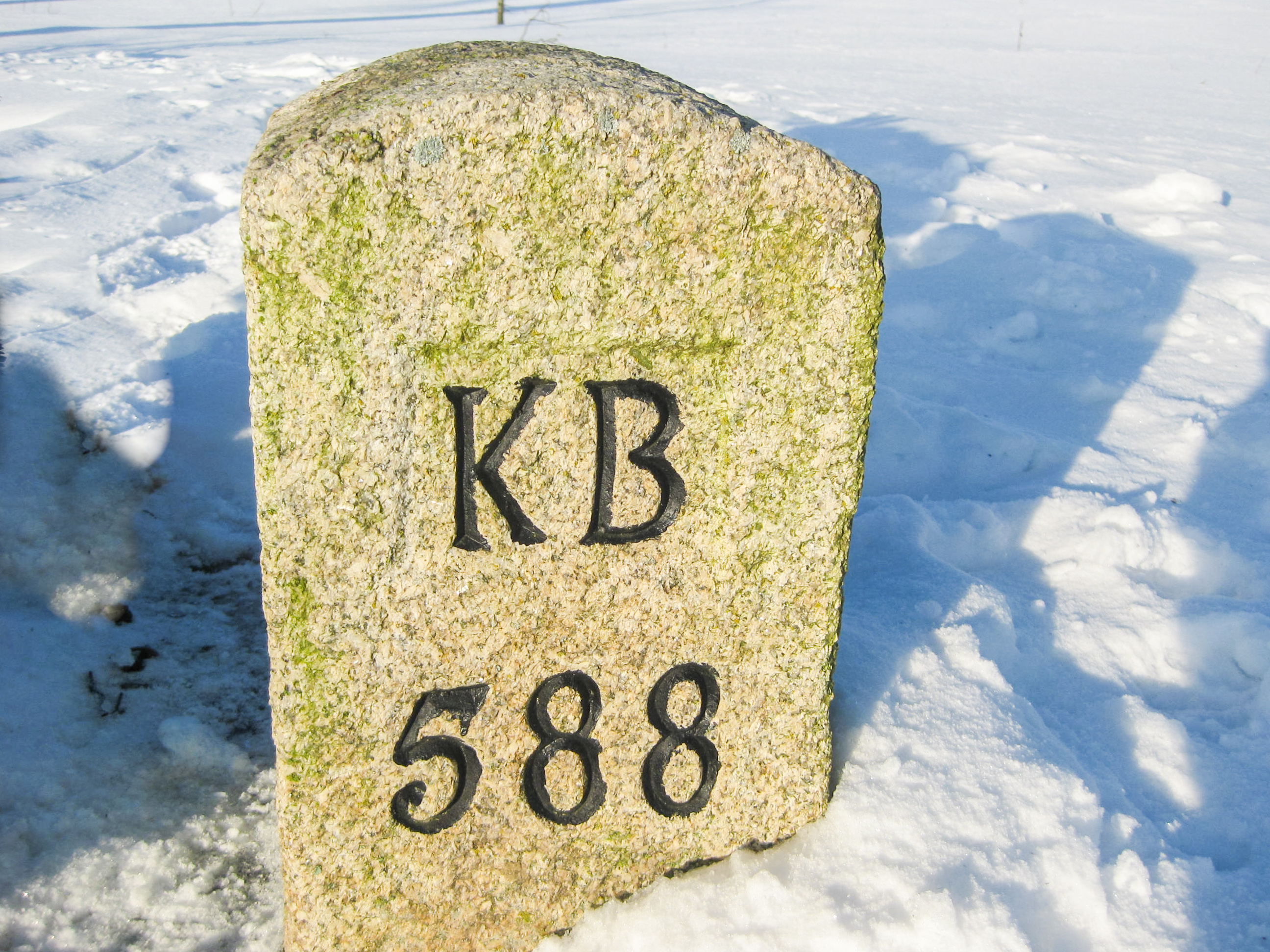 Drei-Freistaaten-Stein bei Münchenreuth / Grobau / Gebersreuth von 1854, erneuert 2007 Text: F.R ; 115 ; KB 588 ; KS 588